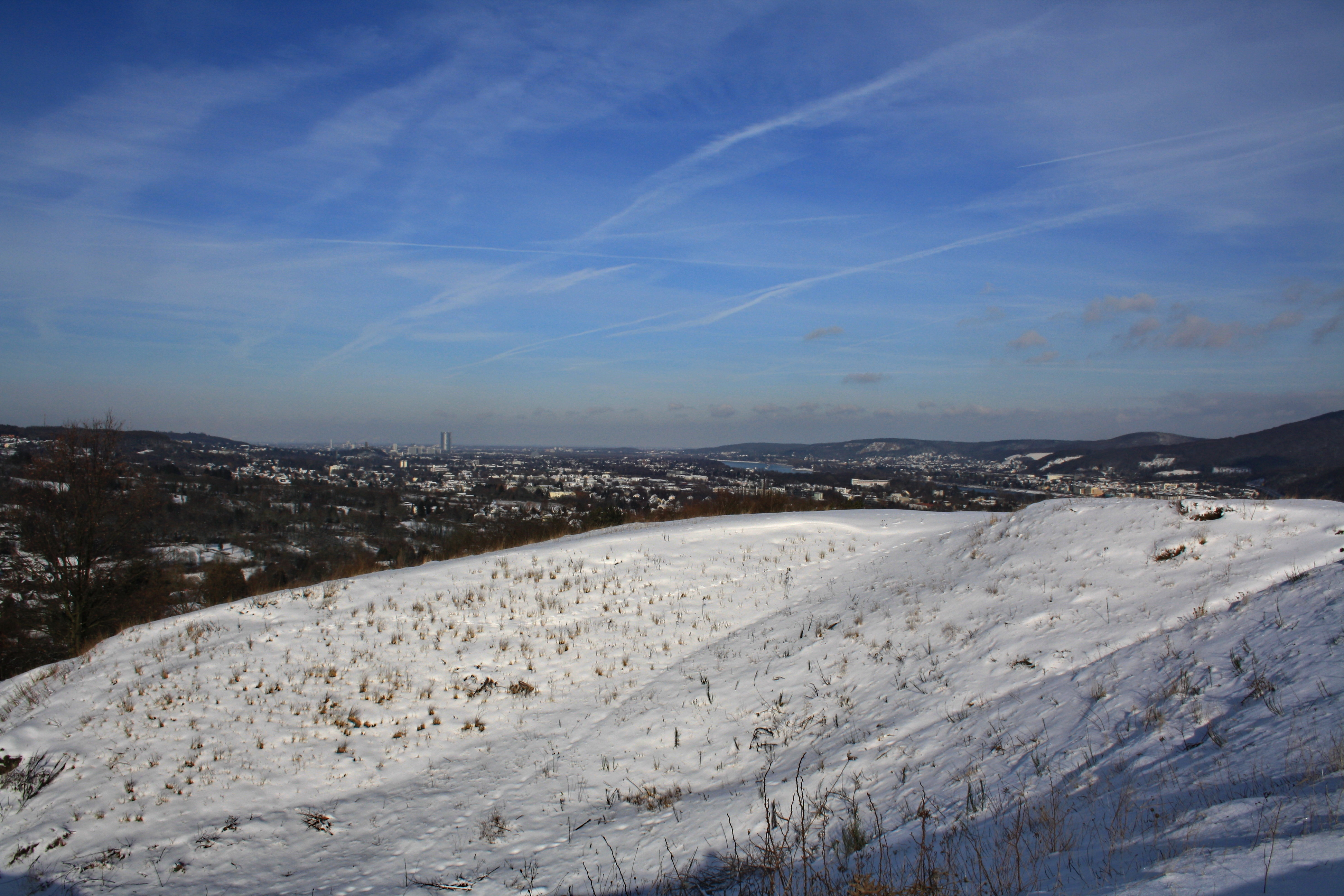 Rodderberg, Blick auf Bonn